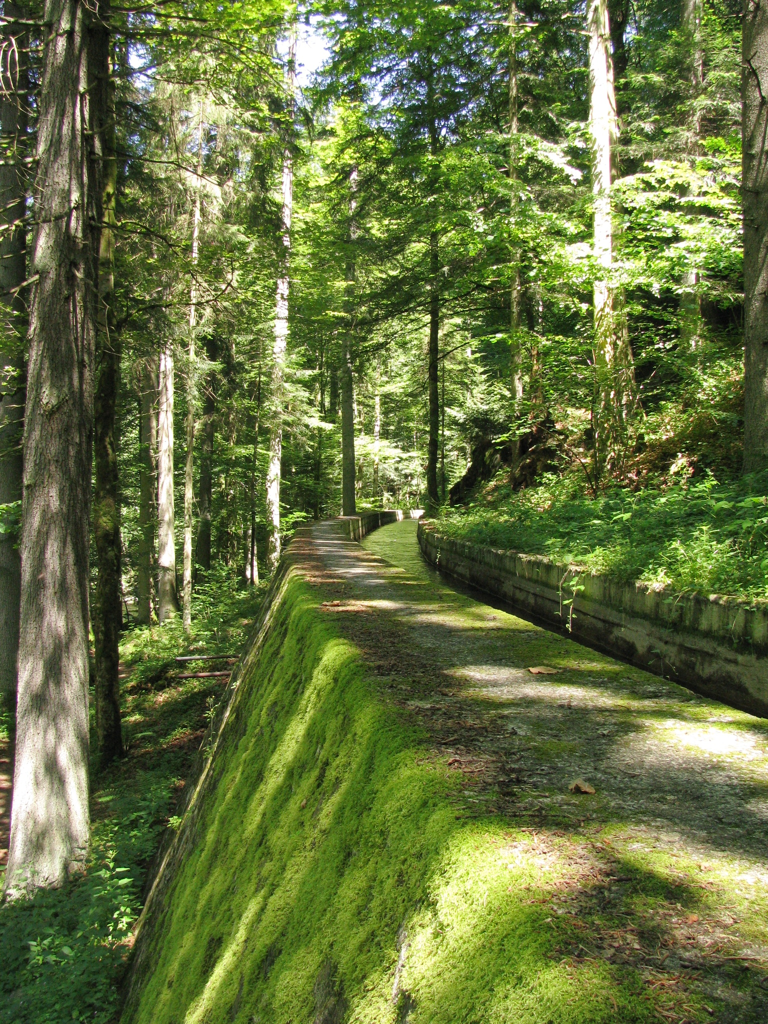 Kanal vom Reschbach- zum Saußbachwerk in der Buchberger Leite